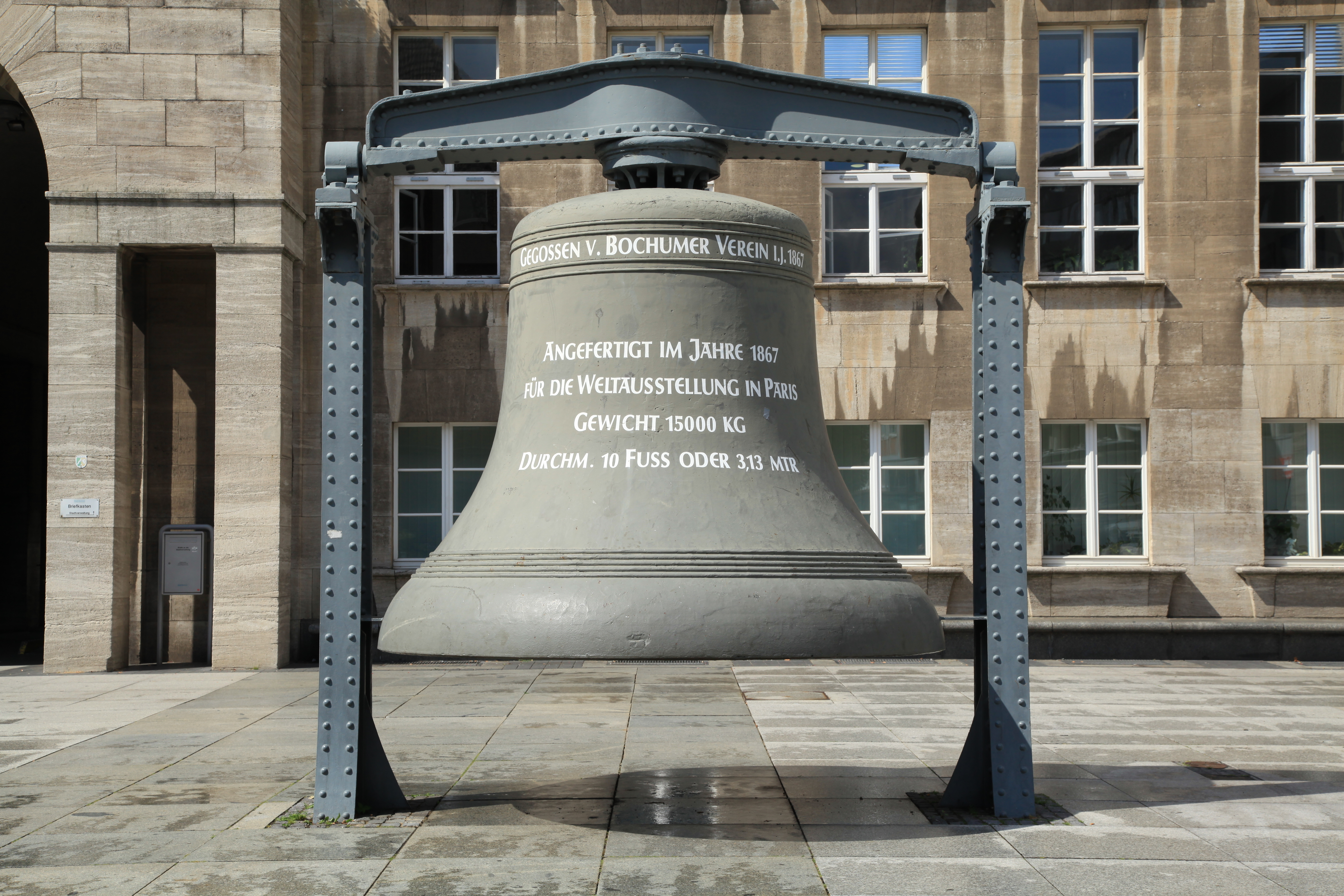 Glocke des Bochumer Vereins vor dem Rathaus, Willy-Brandt-Platz in Bochum